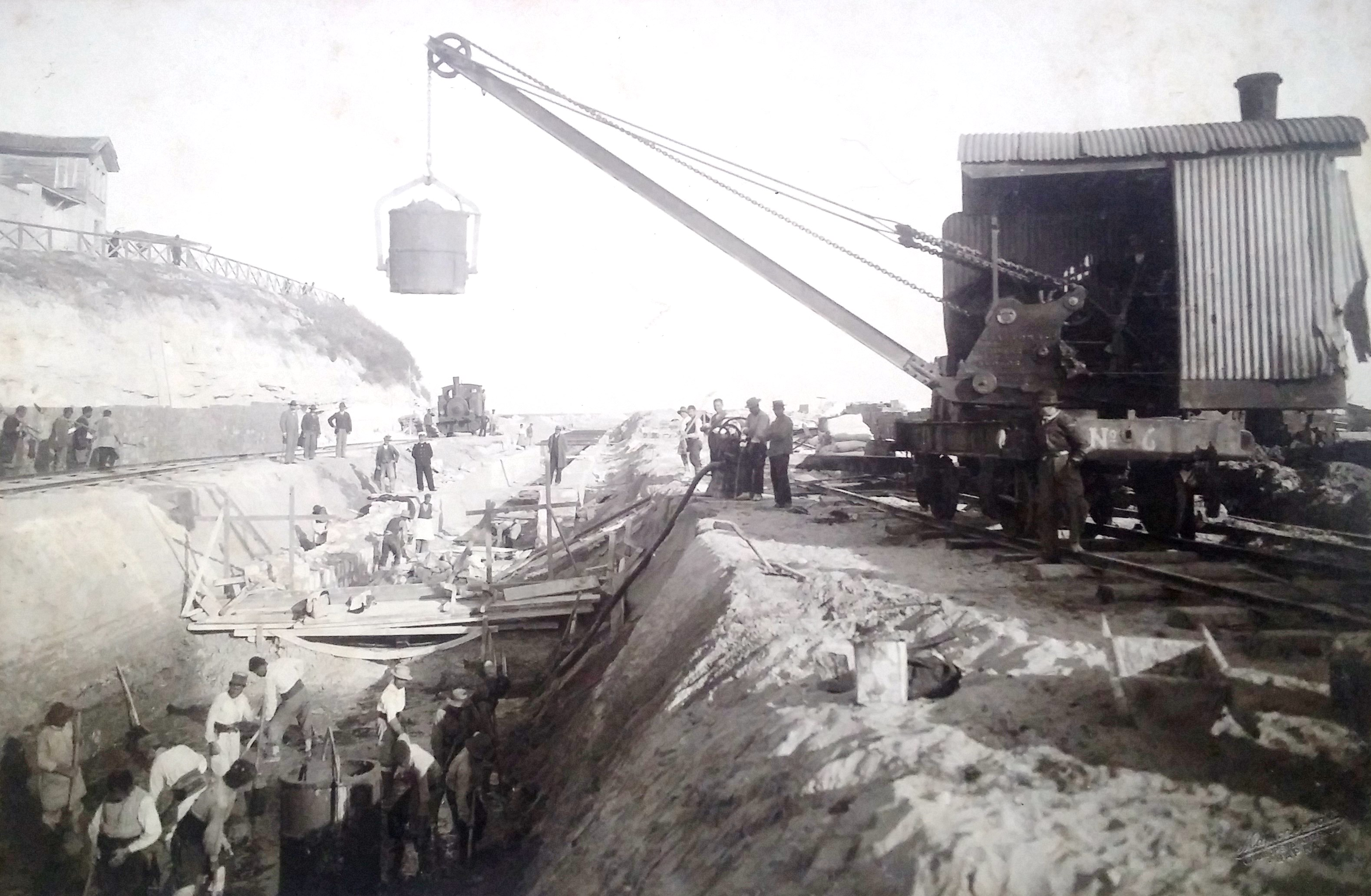 Снимки на членове на техническия състав на БАД за направа на Варненското пристанище, на работници, обекти, машини и съоръжения по време на строителните работи.